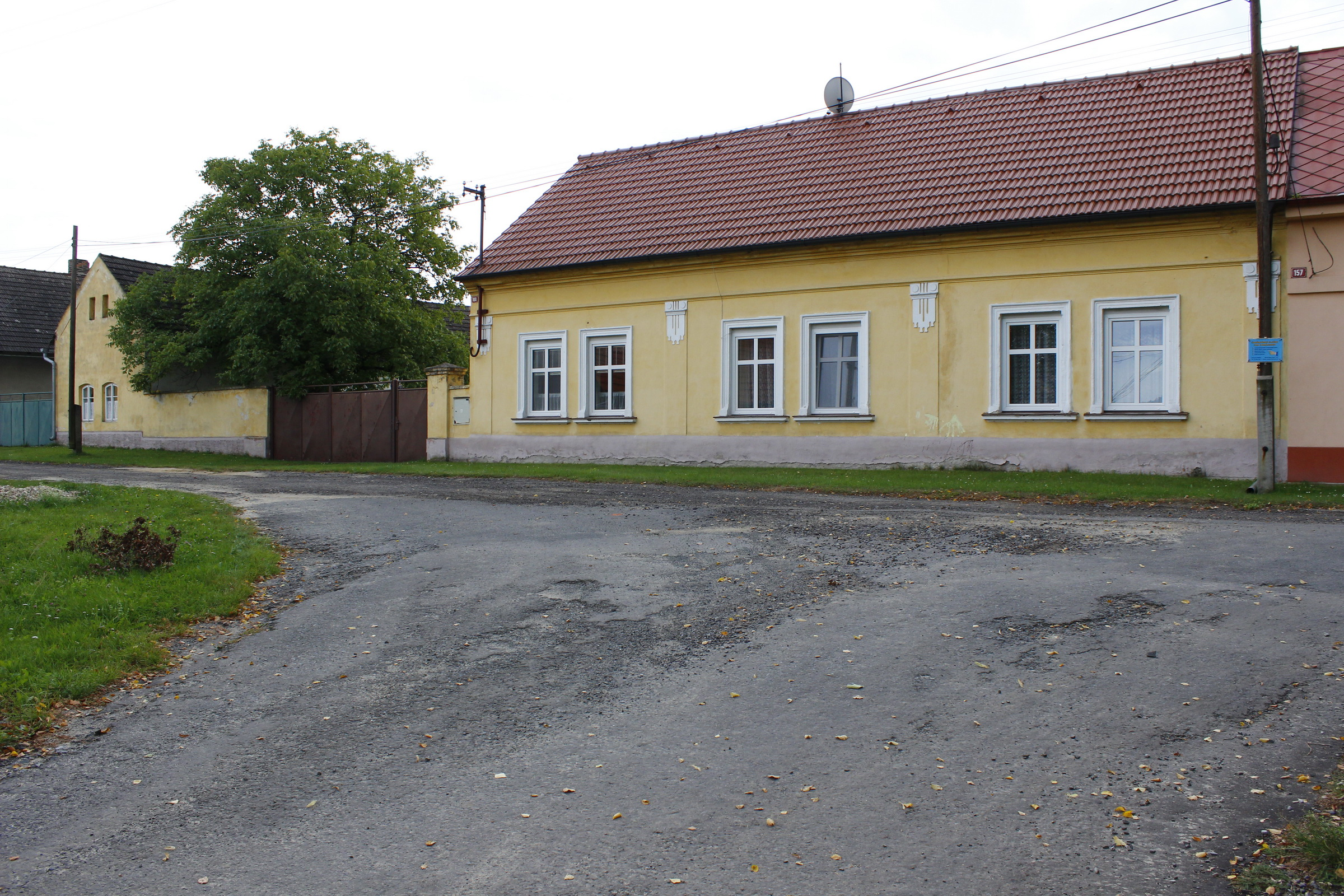 Stará Lysá, dům čp. 100 s výminkem.